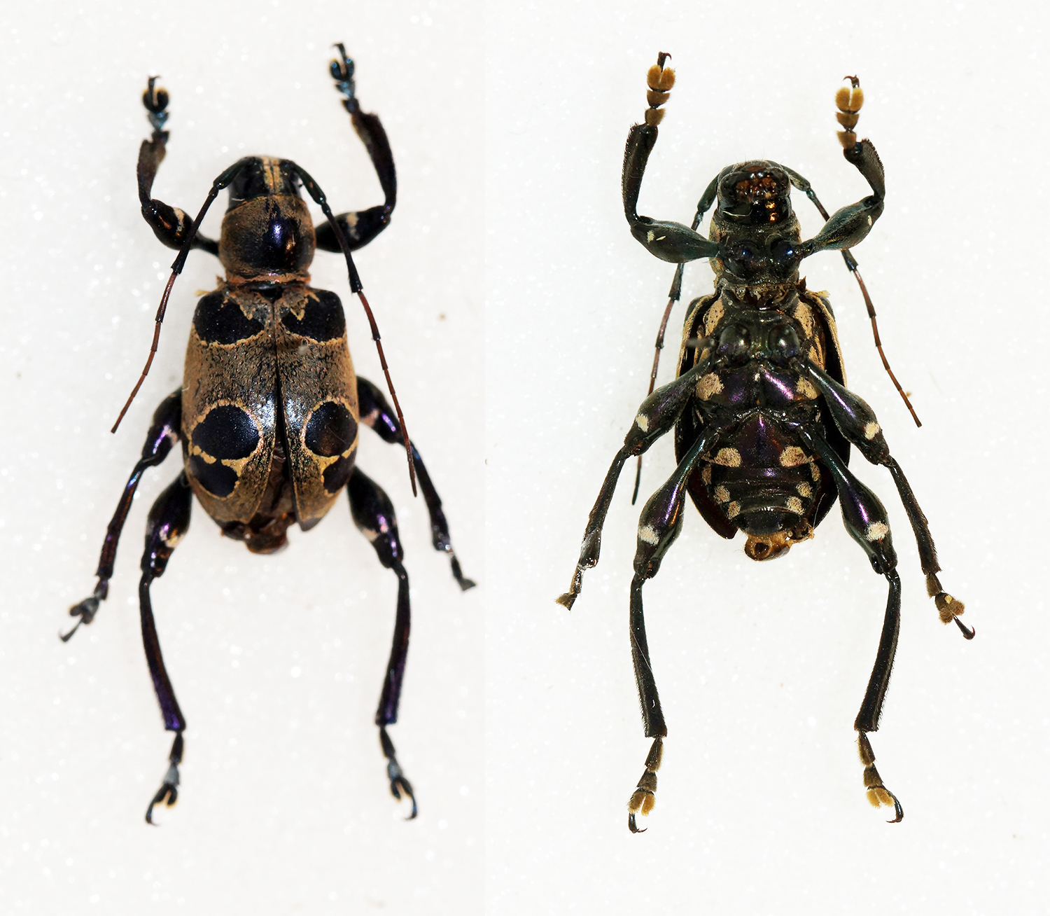 Breuning,1928 Sex: ? Data: 09-2014 - Sta Ana - Cagayan - North Luzon - Philippines Size: 12.5mm